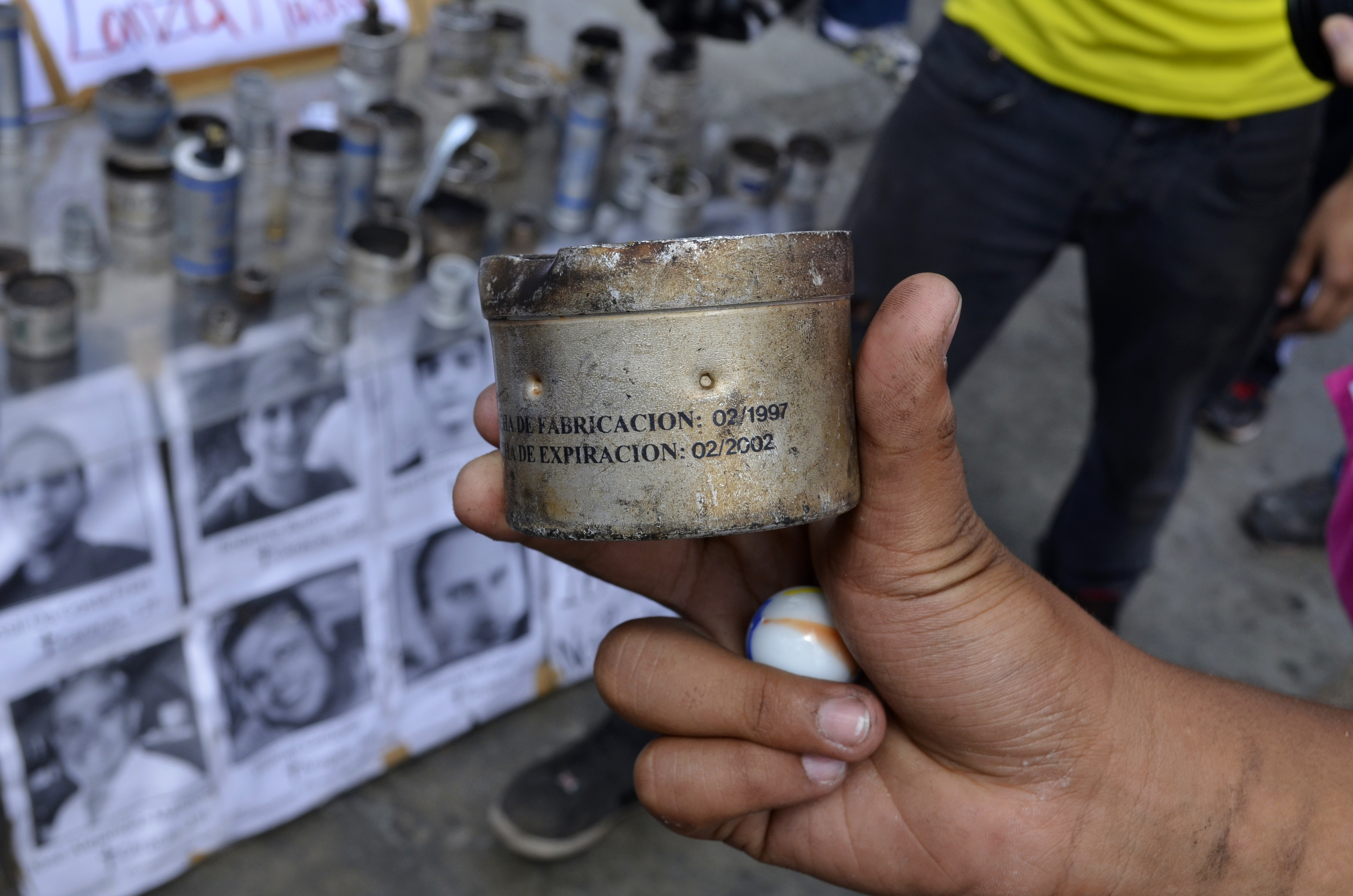 Lacrimógenas vencidas 28Feb14, Altamira